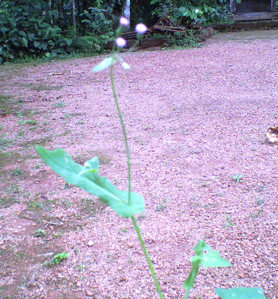 മുയല്‍ച്ചെവിയന്‍ എന്ന ചെടിയുടെ ചിത്രം